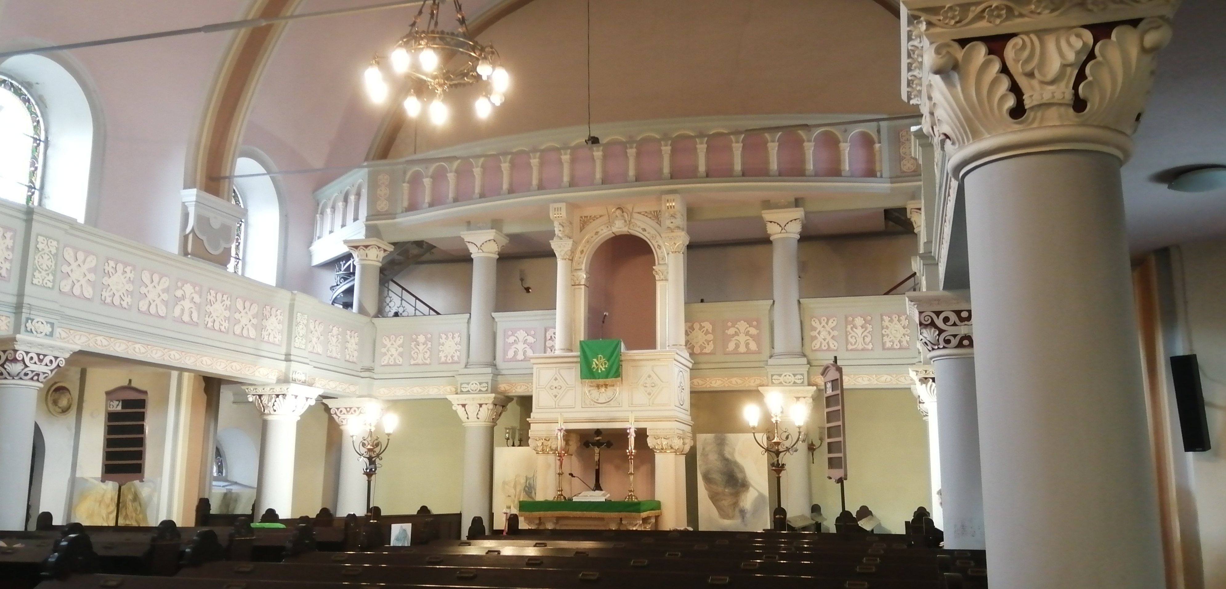 Wnętrze ewangelicko-augsburskiego kościoła Zbawiciela w Tarnowskich Górach